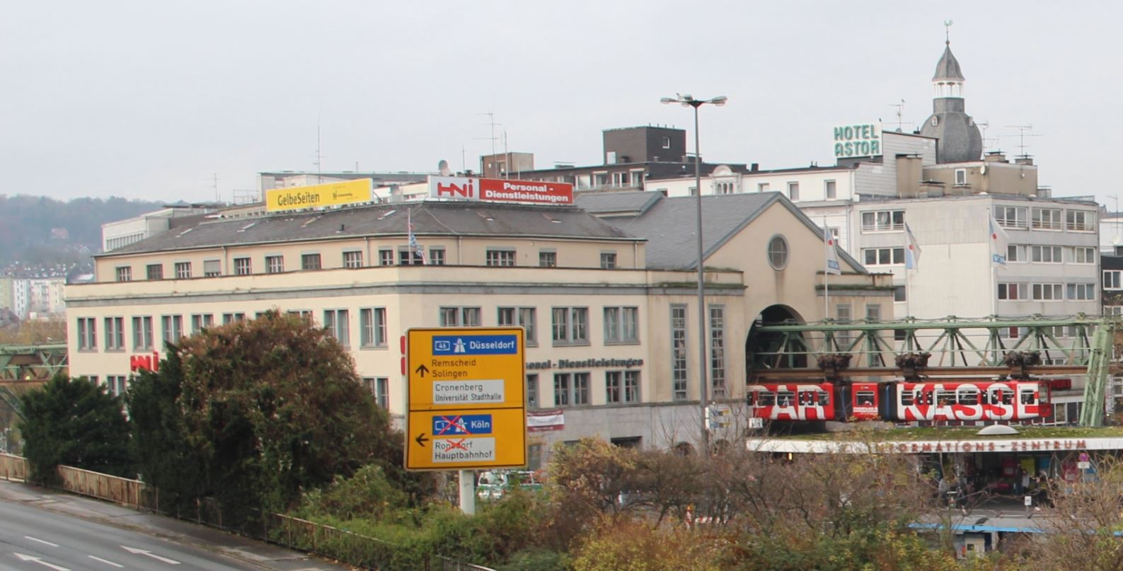 Köbo-Haus und Schwebahnstation Döppersberg aus südöstlicher Blickrichtung, vor dem Umbau (by Niederkasseler)